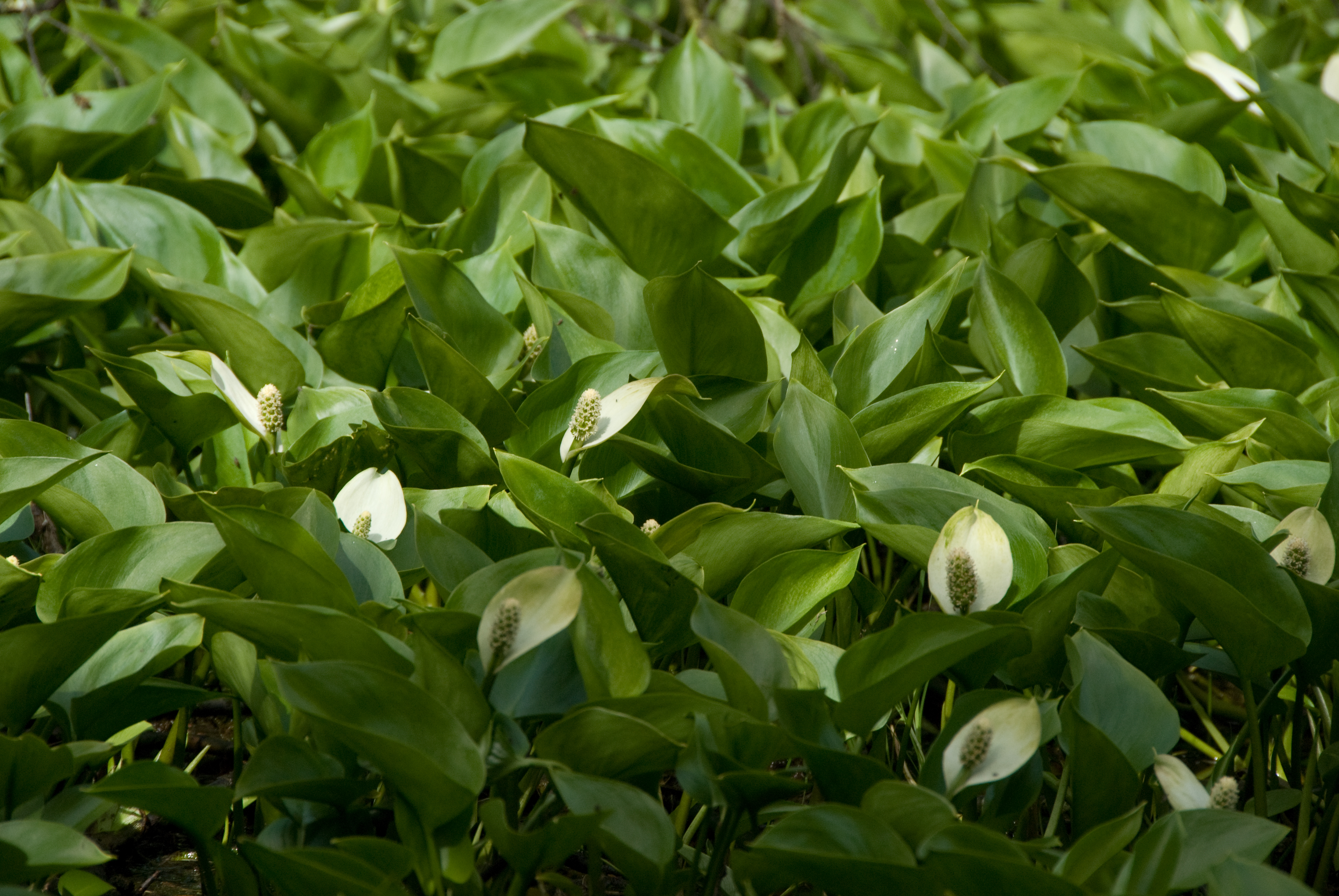 Schlangenwurz bzw. Drachenwurz (Calla palustris) bedeckt einen ganzen Tümpel im Dosenmoor, Deutschland